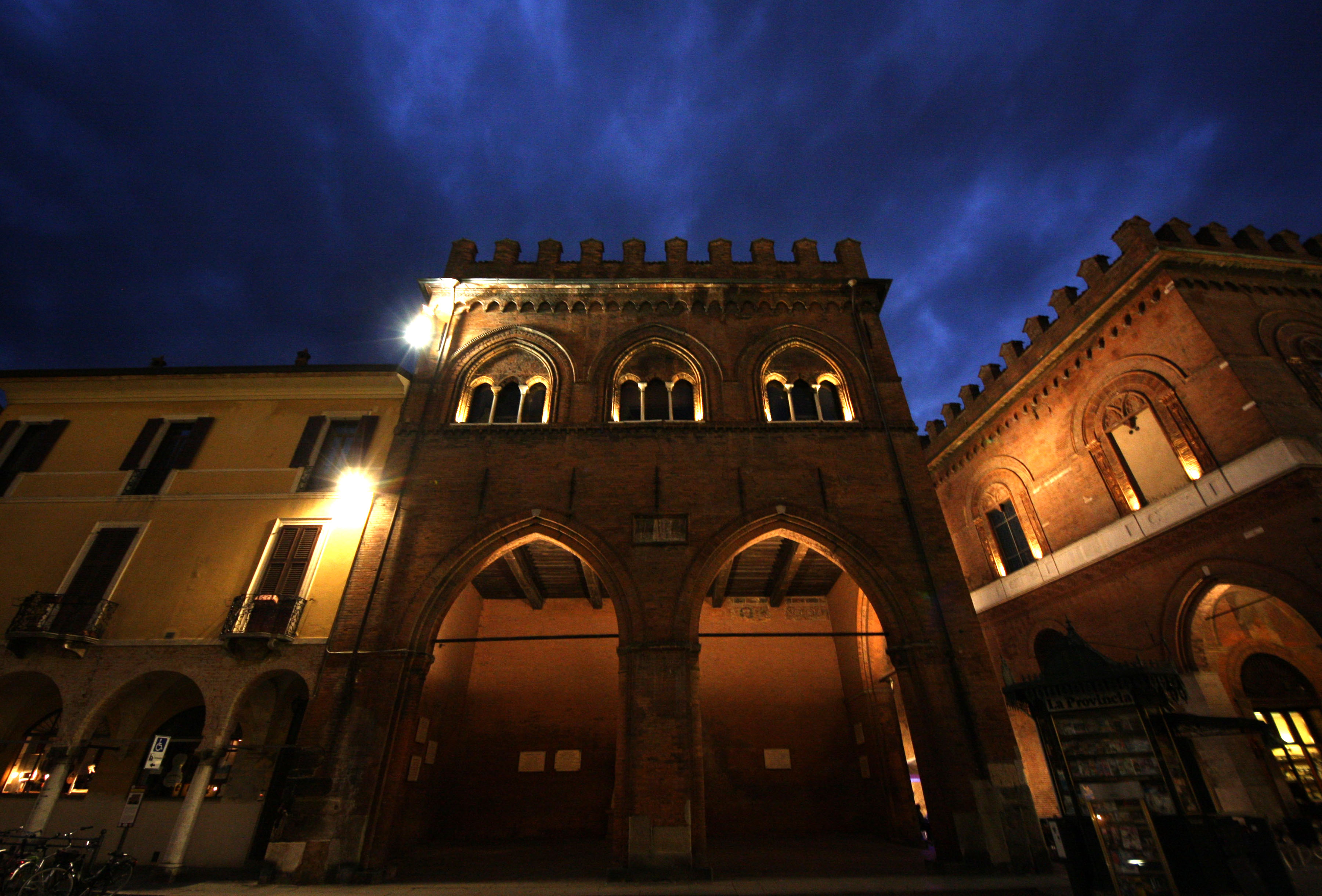 Loggia dei Militi This is a photo of a monument which is part of cultural heritage of Italy.